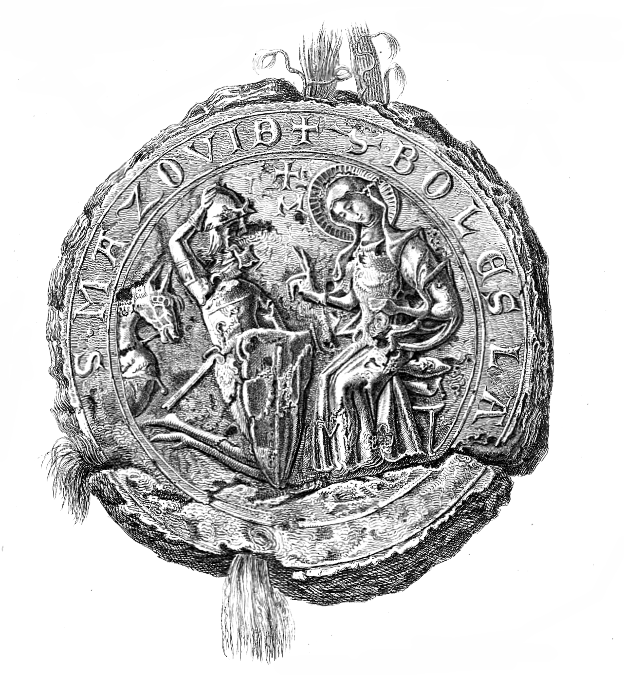 seal of Polish duke Bolesław II Mazowiecki